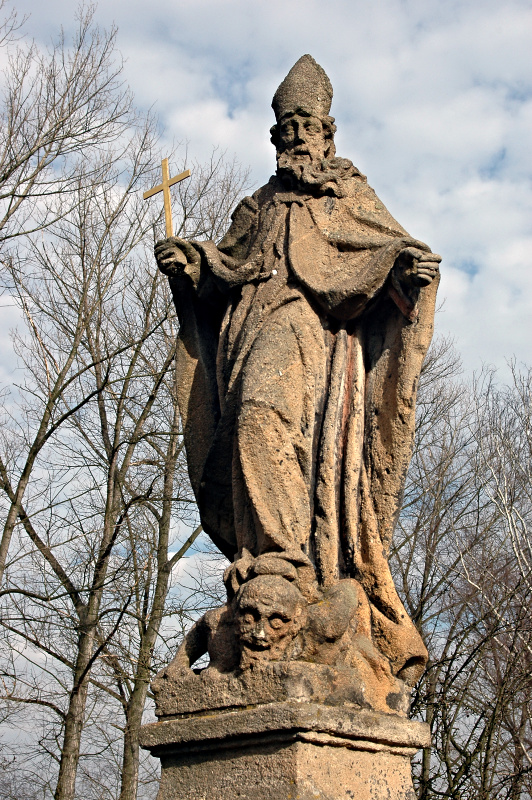 Socha sv. Prokopa (Senomaty), před čp. 102, na konci obce při silnici do Rakovníka, Senomaty